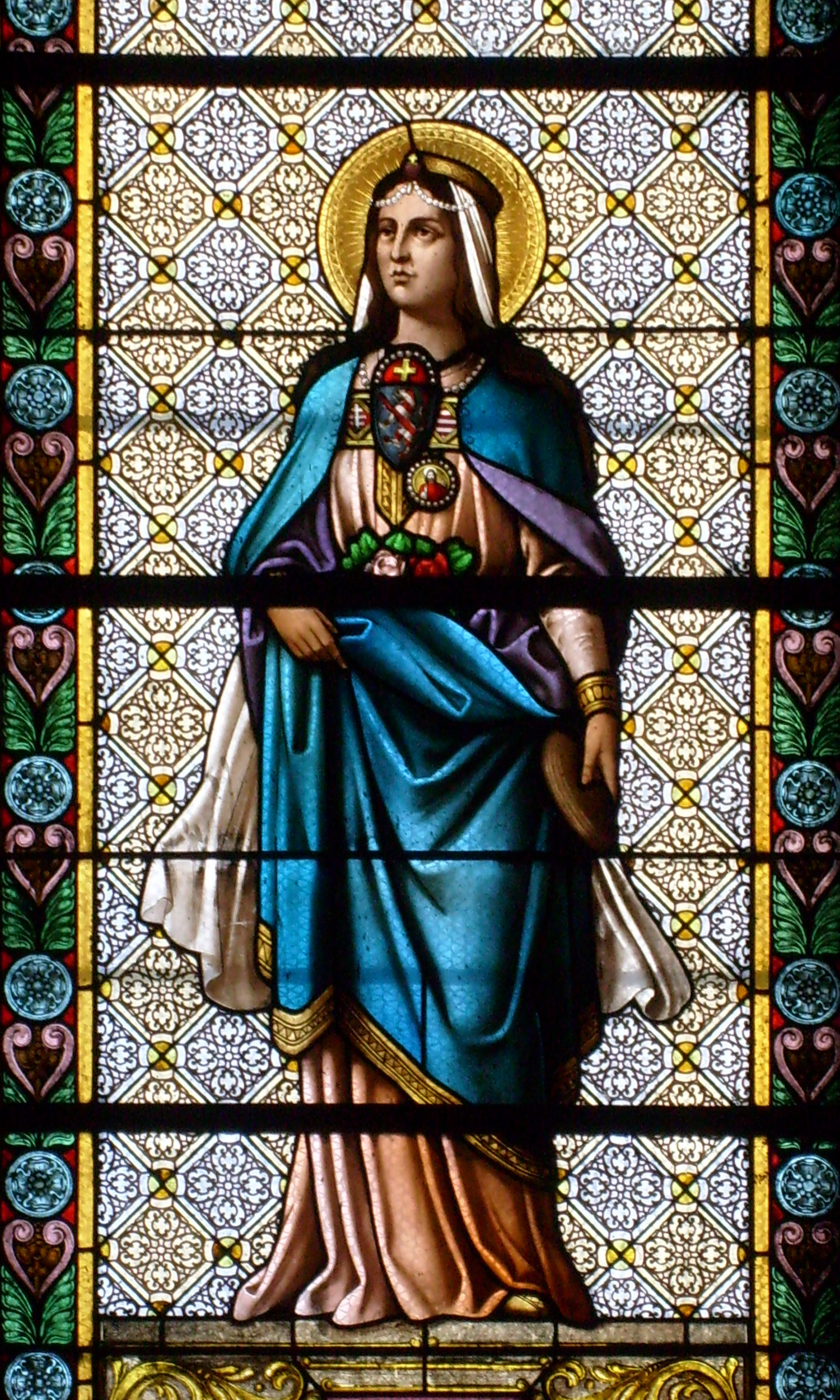 Vitraliu din Biserica Minoriţilor (Catedrala Schimbarea la Faţă) din Cluj, reprezentând-o pe Sf. Elisabeta de Thuringia.